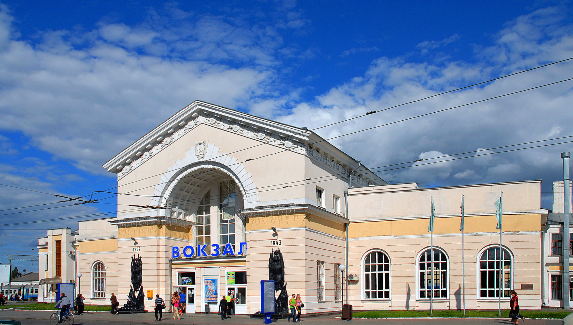 Південний вокзал, Полтава, площа Слави